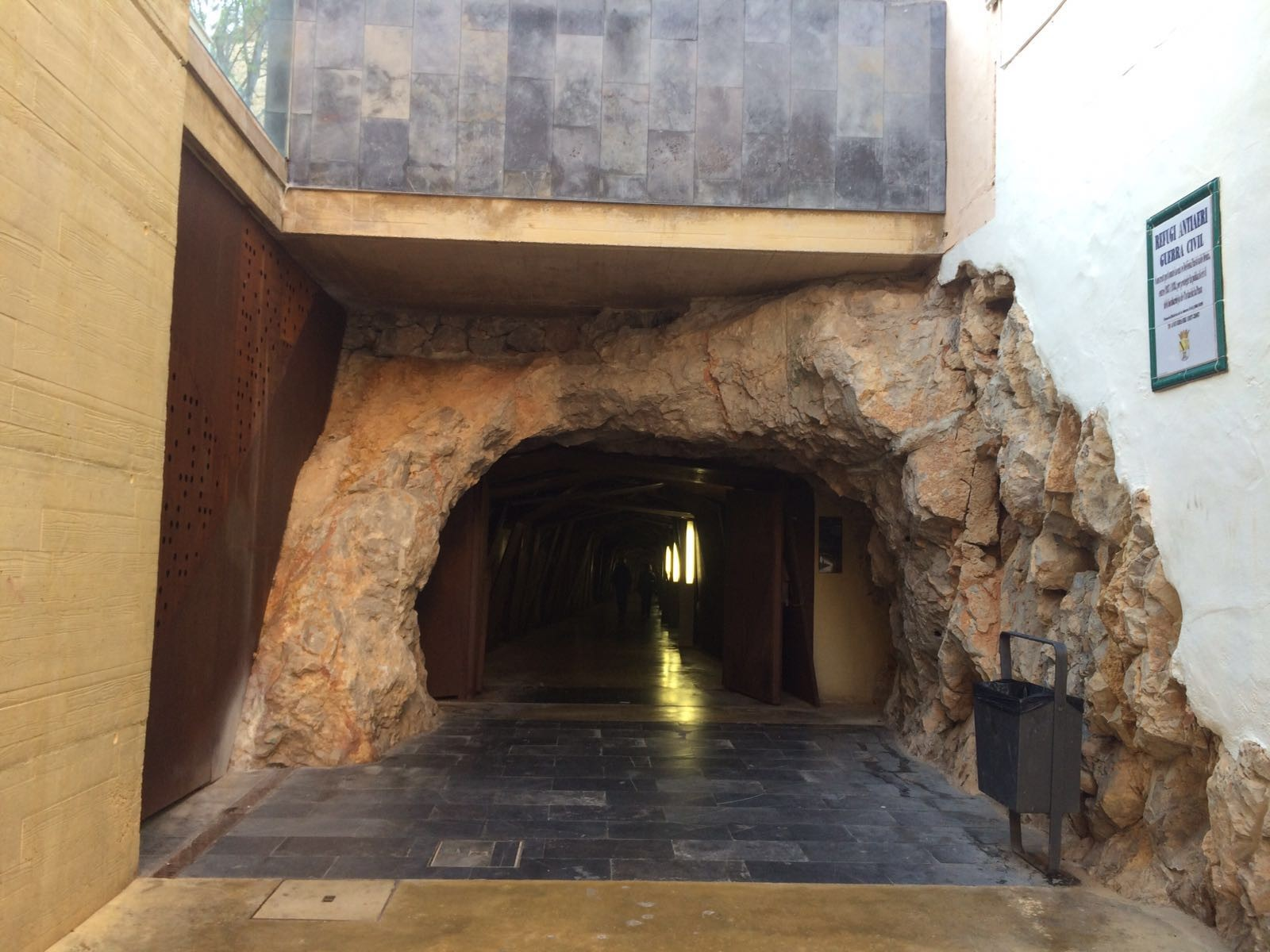 Entrada sur del túnel de Dénia, con el cartel conmemorativo a la derecha.